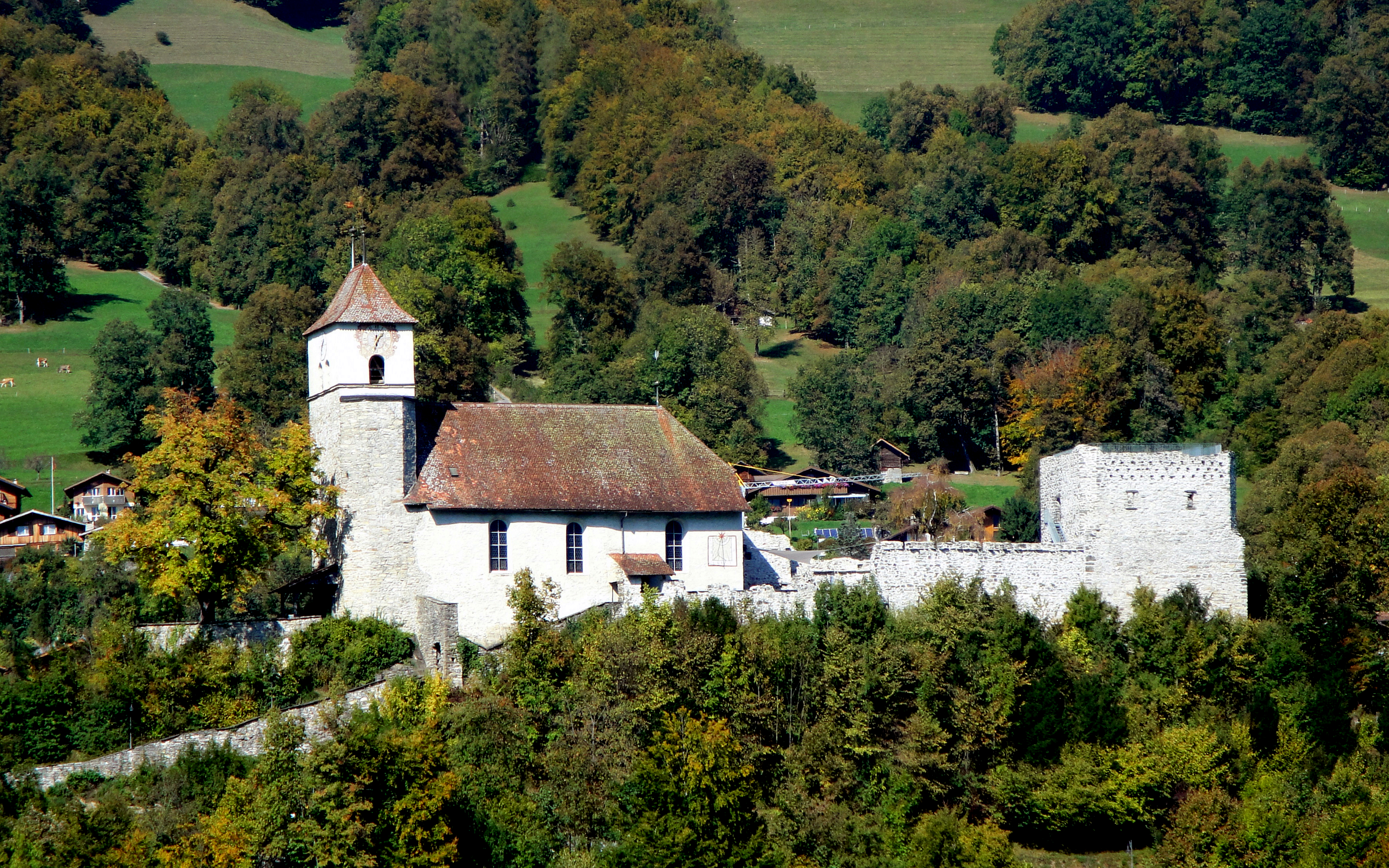 Ringgenberg, Kirche und Burgruine